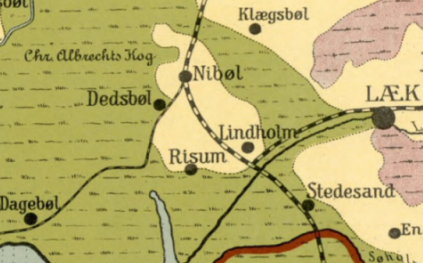 Kort over Nibøl-området, Detail fra Gustav Rosendals Sønderjyllandkort med amtsgrænserne fra 1913